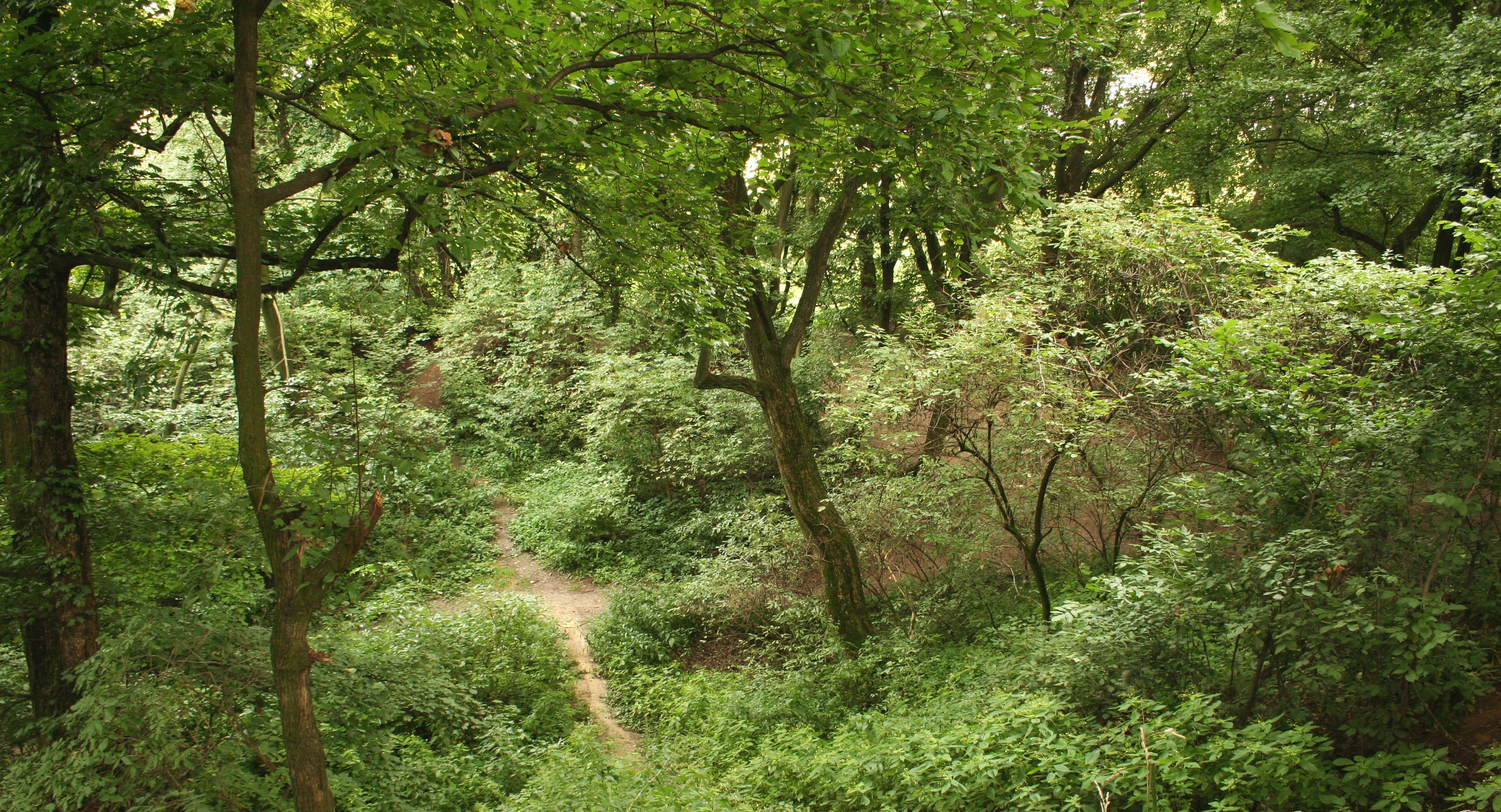 Rezerwat "Lisia Góra", w Rzeszowie